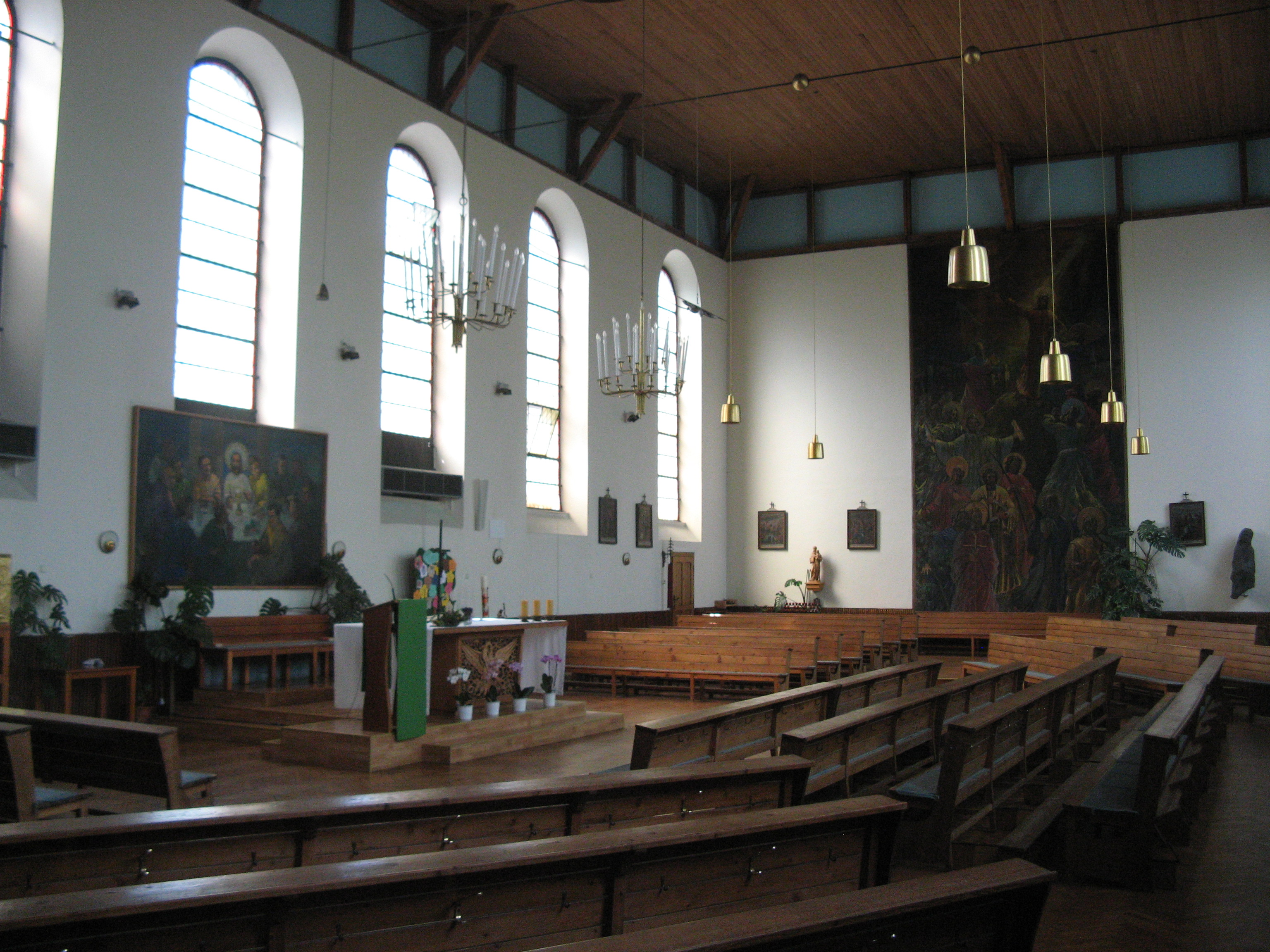 Inneres der Apostelkirche, Salvatorianerplatz 1, Wien-Favoriten